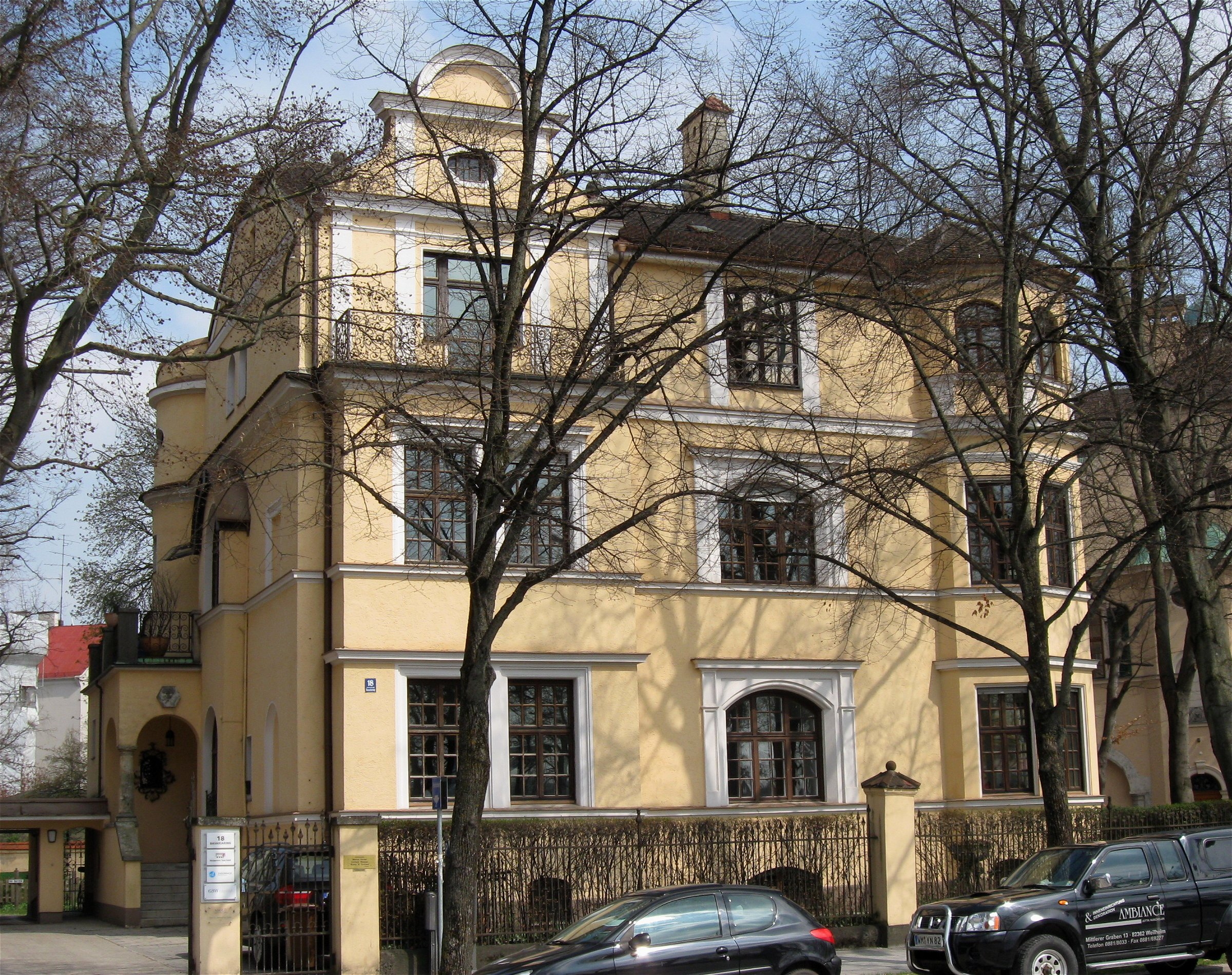 Bavariaring 18; Villa, deutsche Renaissance, 1887–88 von Emanuel von Seidl